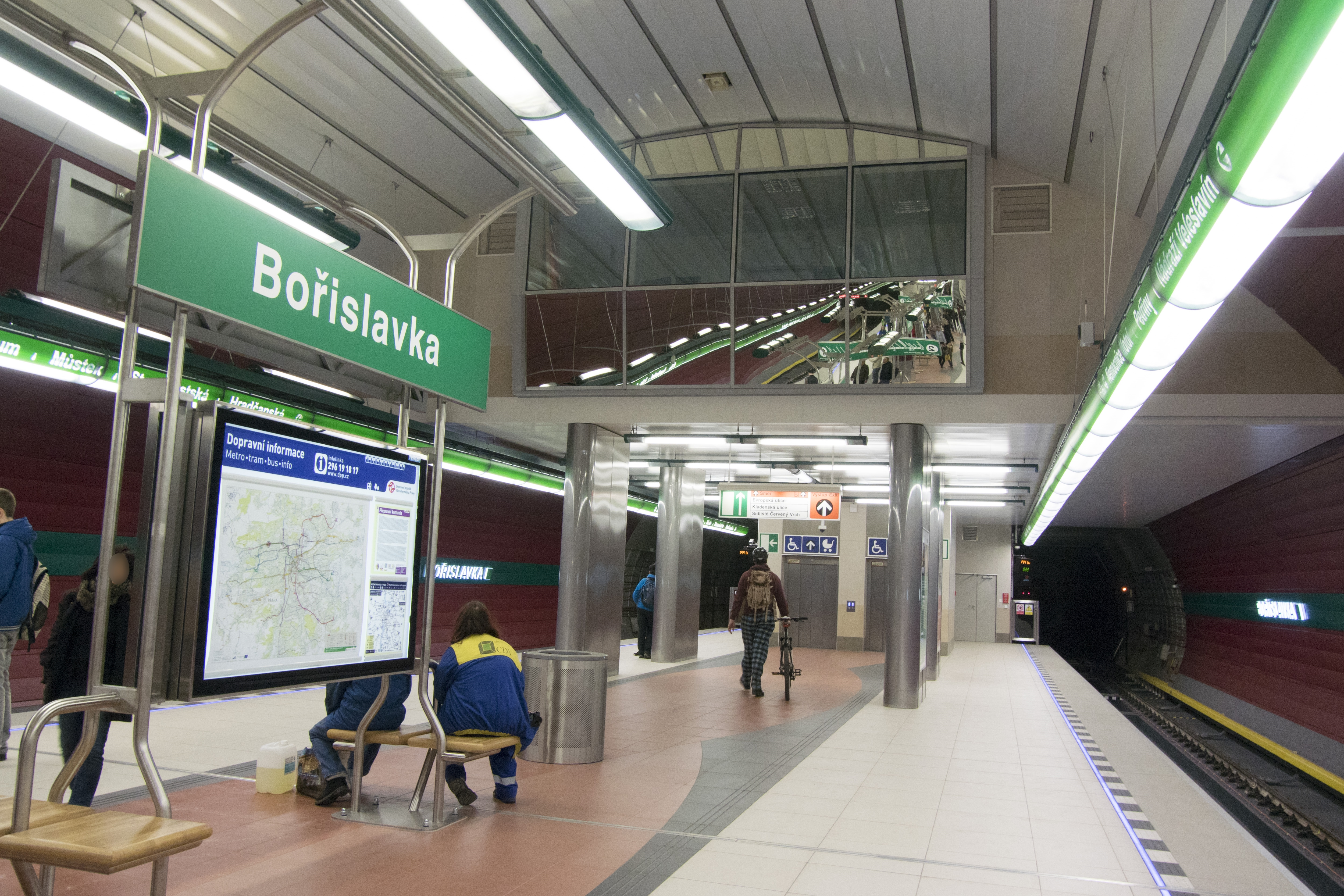 Metro trasy A - Bořislavka - 9.4.2015